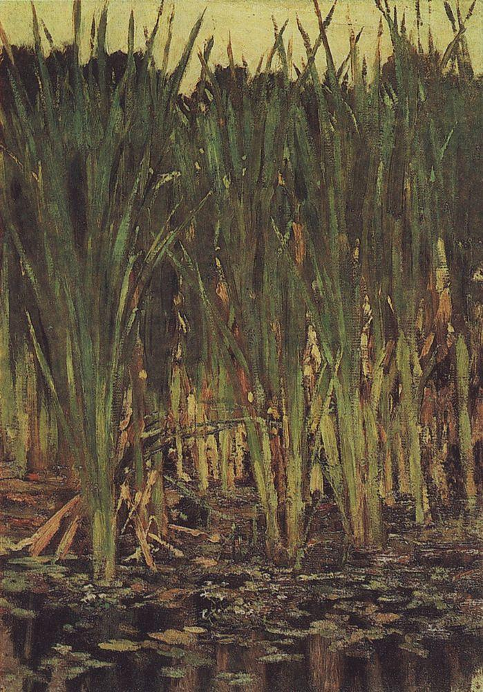 Эскиз для картины «Алёнушка», исполненной в 1881 г., находящейся в Государственной Третьяковской галерее. Размер произведения в сантиметрах (высота на ширину): 48,4 х 33,5. Холст, наклеенный на картон, масляные краски. Приобретена в 1941 г. у Н. А. Соколова. Произведение записано в инвентарной книге Государственной Третьяковской галереи под номером 26602.